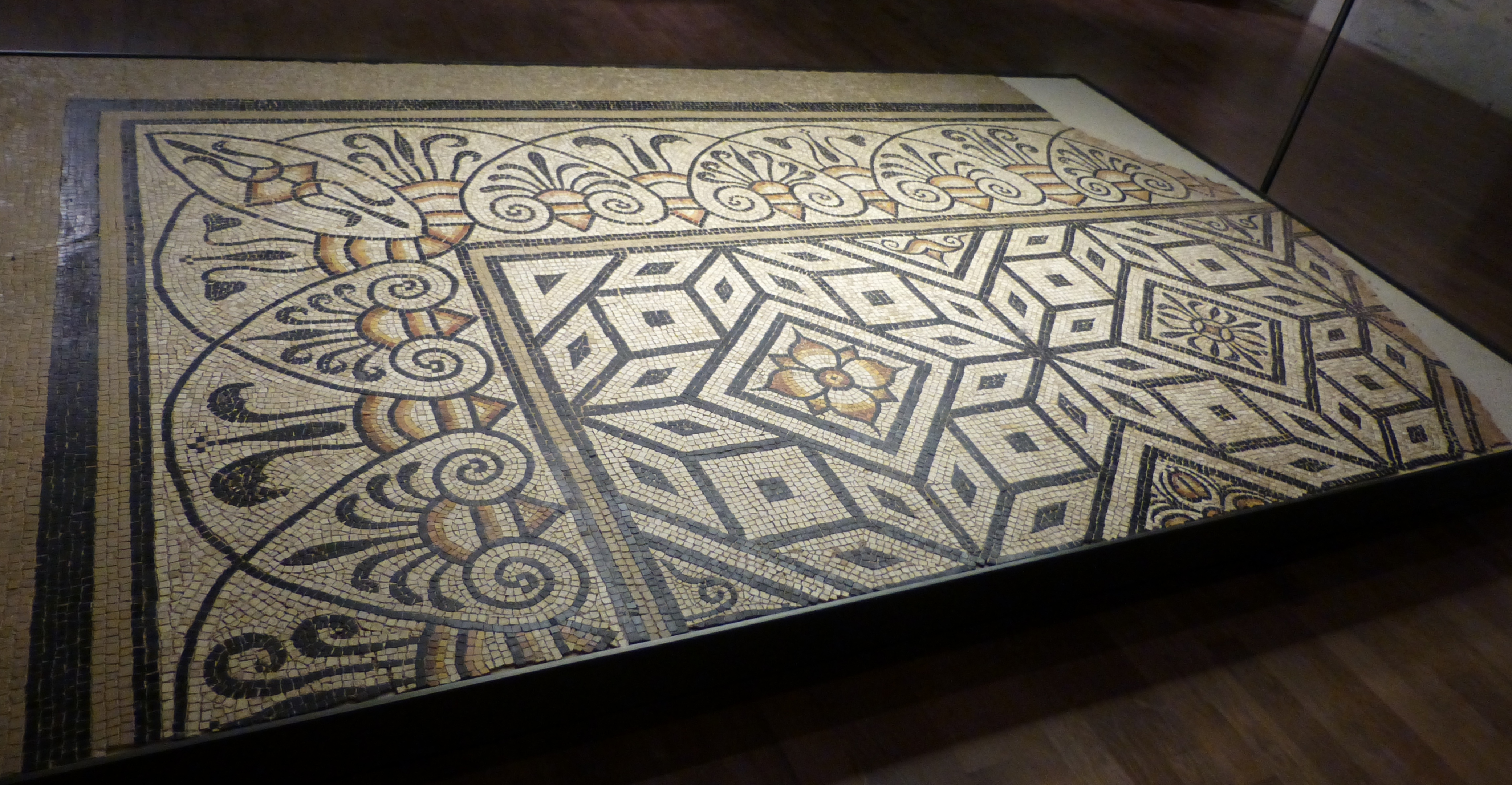 Angers, Musée des Beaux-Arts, Mosaïque polychrome dite du ralliement, à décor géométrique et floral, de la fin du II° siècle (fouilles de 1887). Restauration récente.